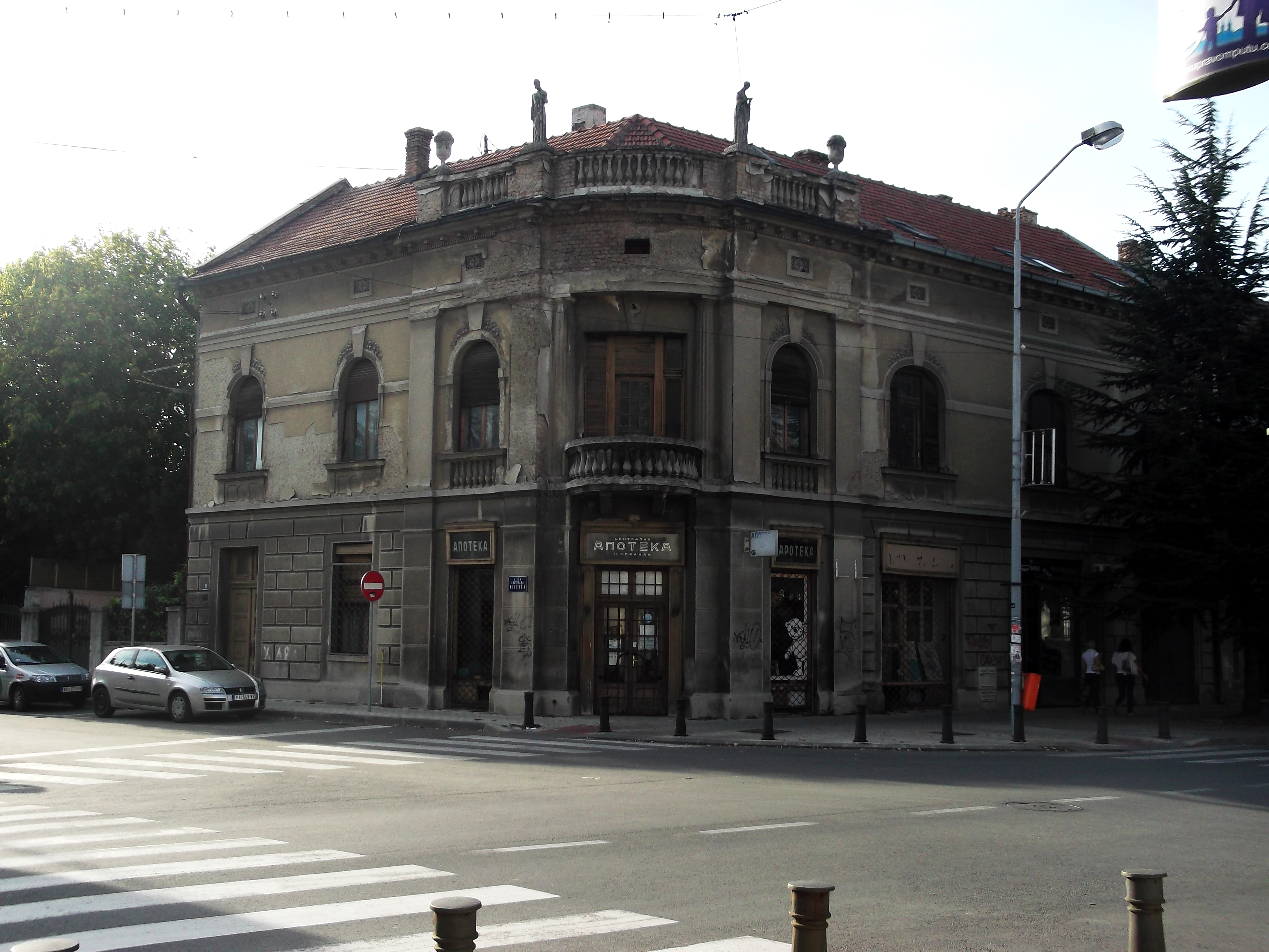 Гајићева апотека